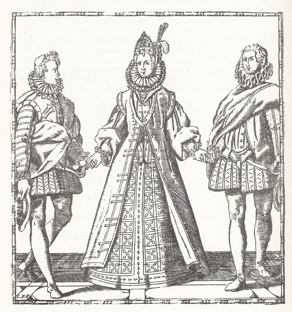 Cesare Negri, Le Gratie d'amore (Milan 1602). Réimpression Bologne 1983. Collection privée.